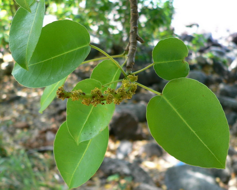 Hippomane mancinella, feuilles et inflorescence